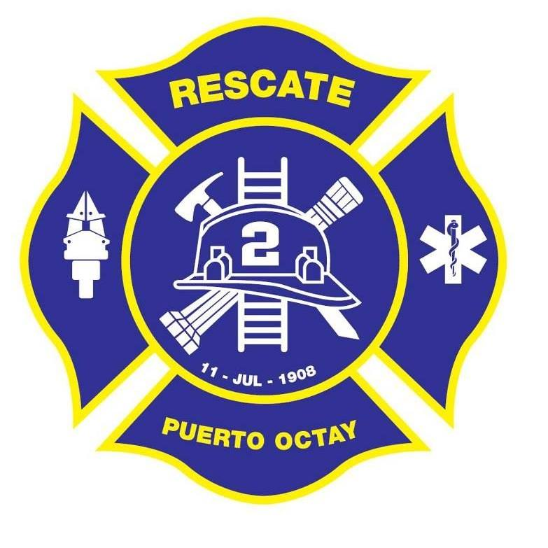 bomberos